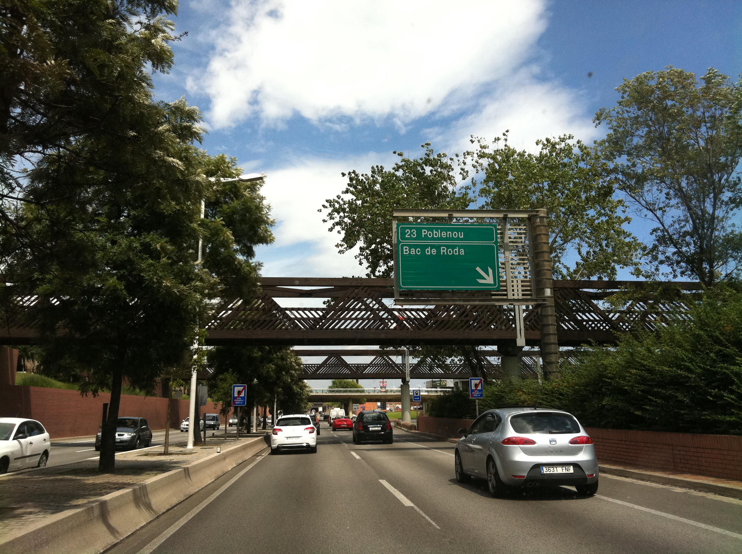 B-10 Ronda litoral de Barcelona durant l'estiu de 2011